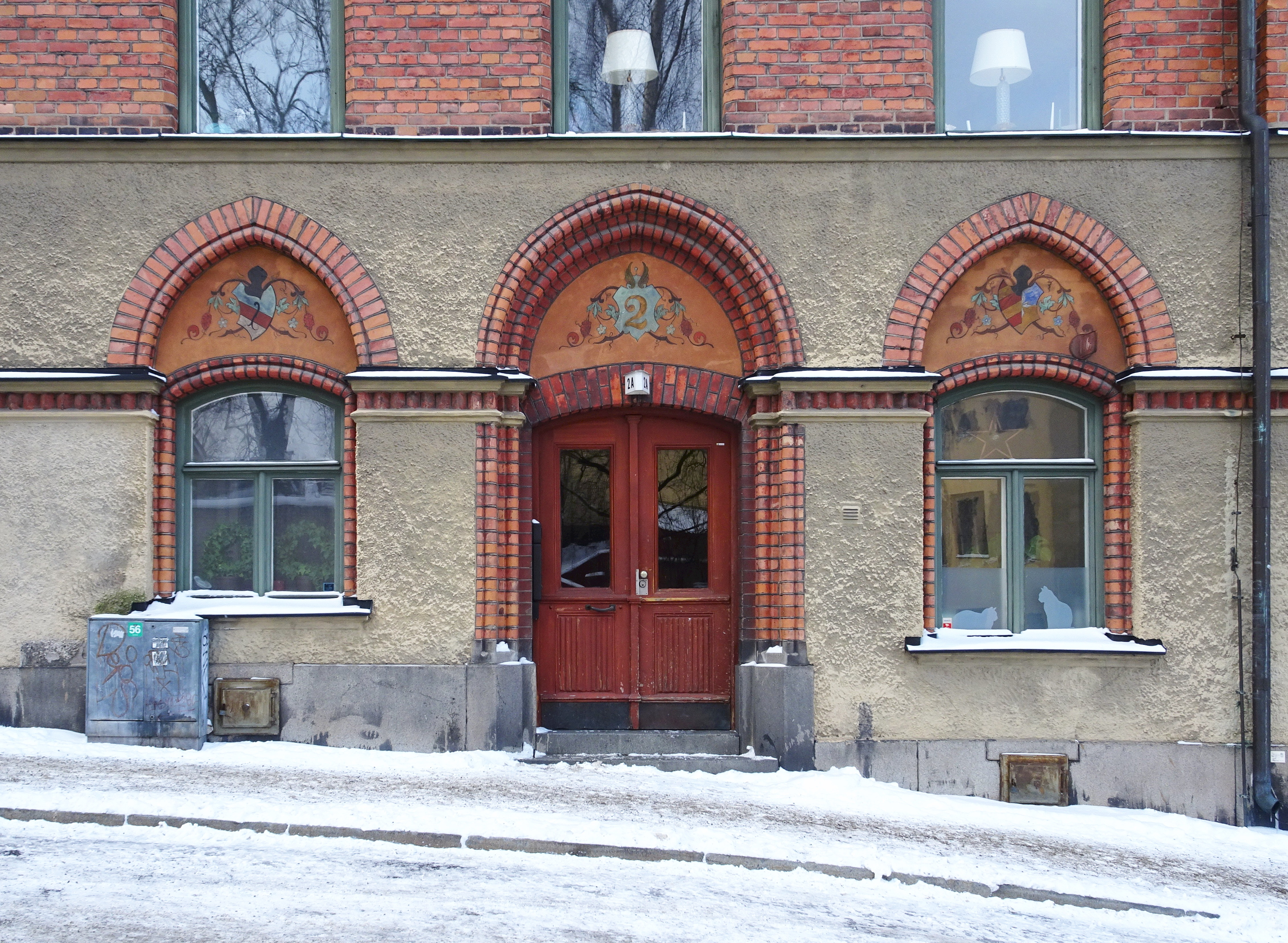 Mälarborgens entré, Timmermansgatan 2